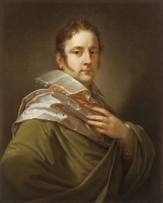 Gegenstücke